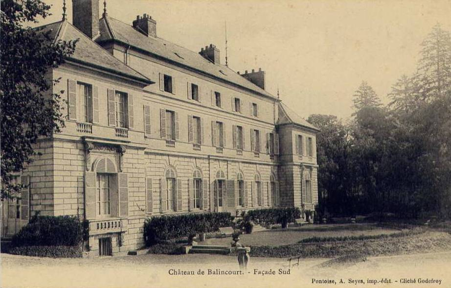 Château de Balincourt (Val d'Oise), façade sud (sur le parc), cliché pris sans doute avant la Première guerre mondiale